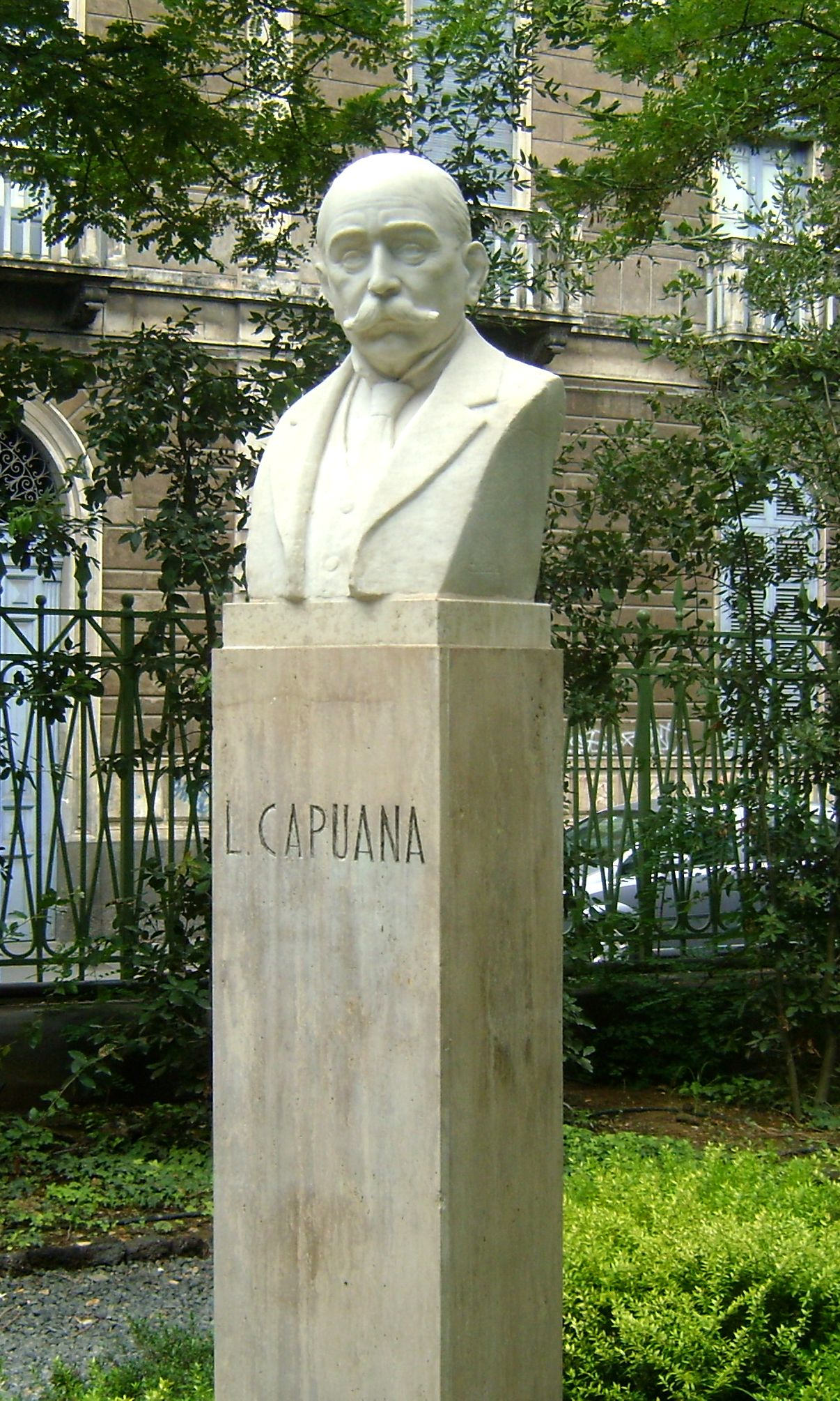 Luigi Capuana - Giardino Bellini Catania - settembre 2010